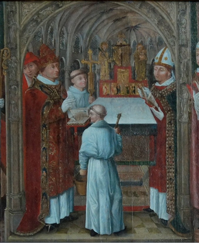 Tableau montrant la Consécration par le pape EUgène III de la cathédrale de Chalons en présence de Guy II de Pierrepont, évêque.